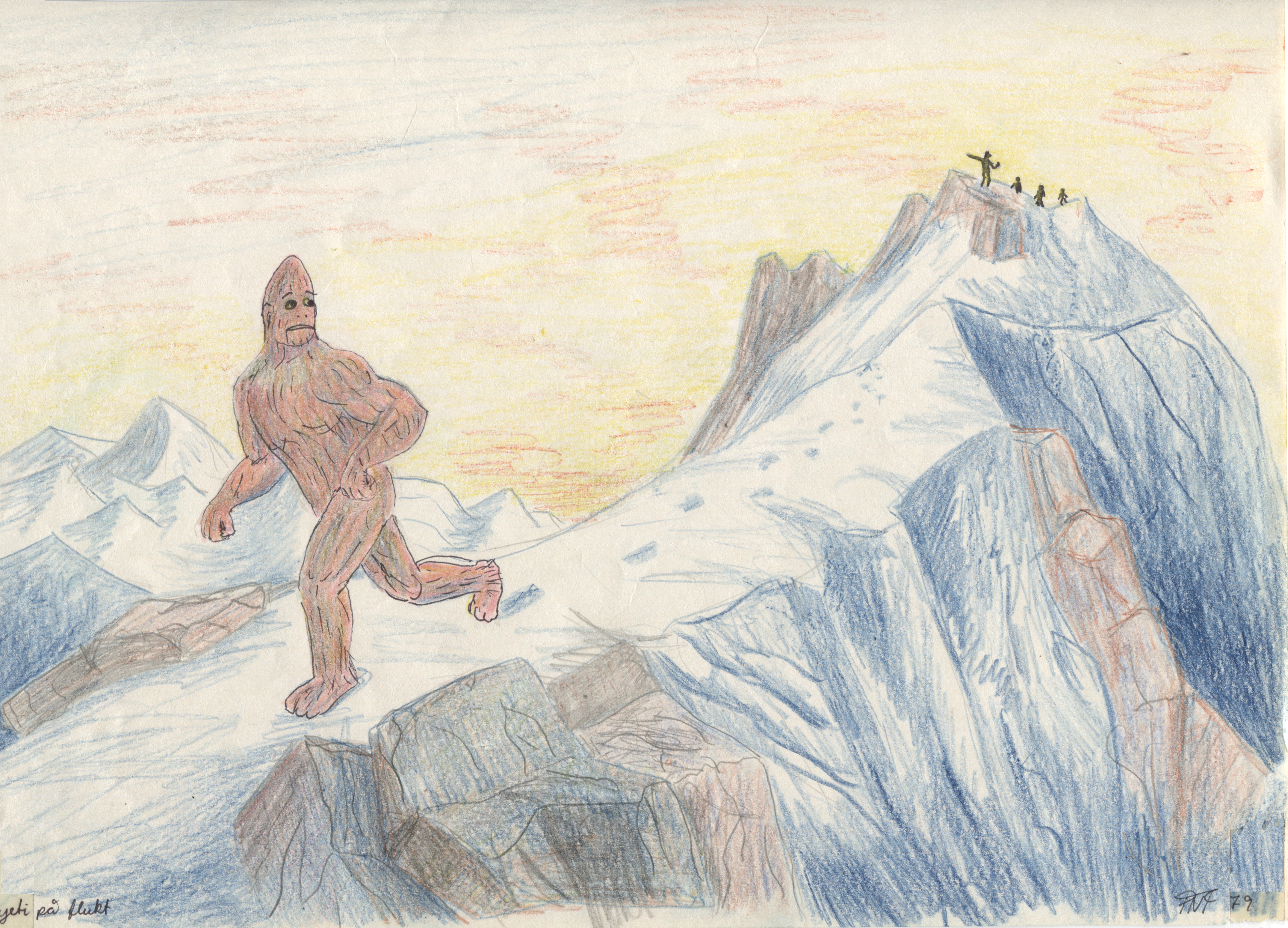 Tegning fra 1979 basert på boken "High in the Thin Cold Air".